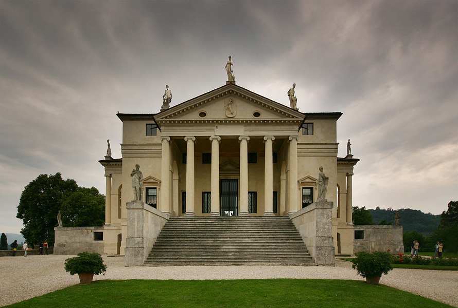 Palladios Villa Rotonda, Veneto, Italy